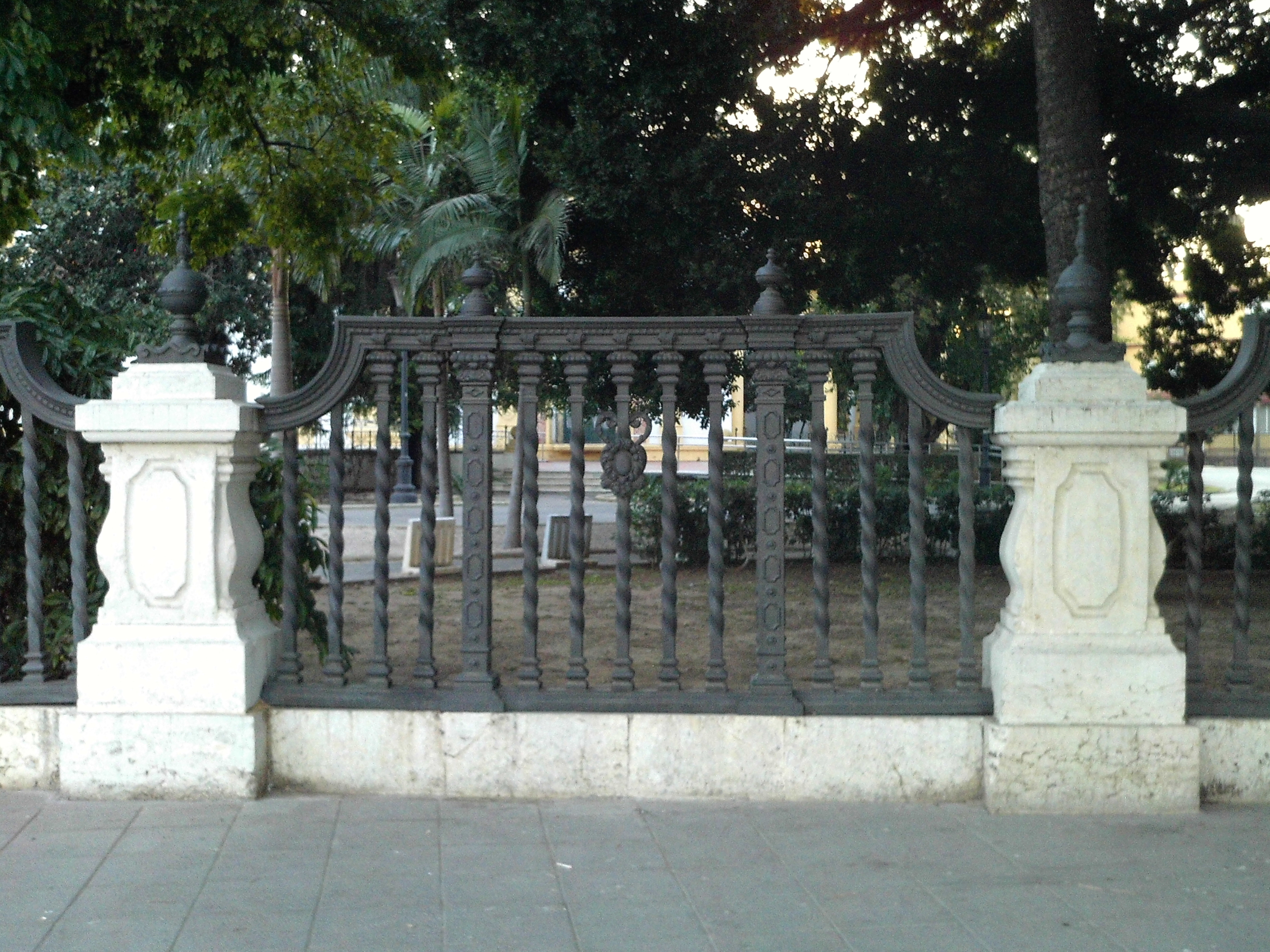 Reja de la Exposición Iberoamericana. Sevilla, Andalucía, España.